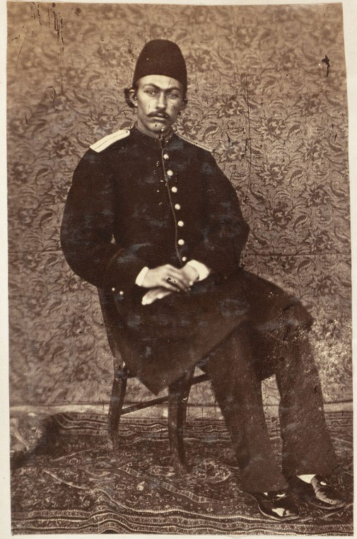 حاکم بوکان - سیف الدین خان مکری فرزند عزیزخان